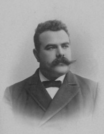 Axel Engdahl (1863-1922)